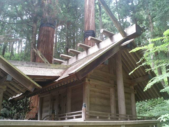 仁科神明宮。NMC100が、2007年9月23日に撮影したものです。